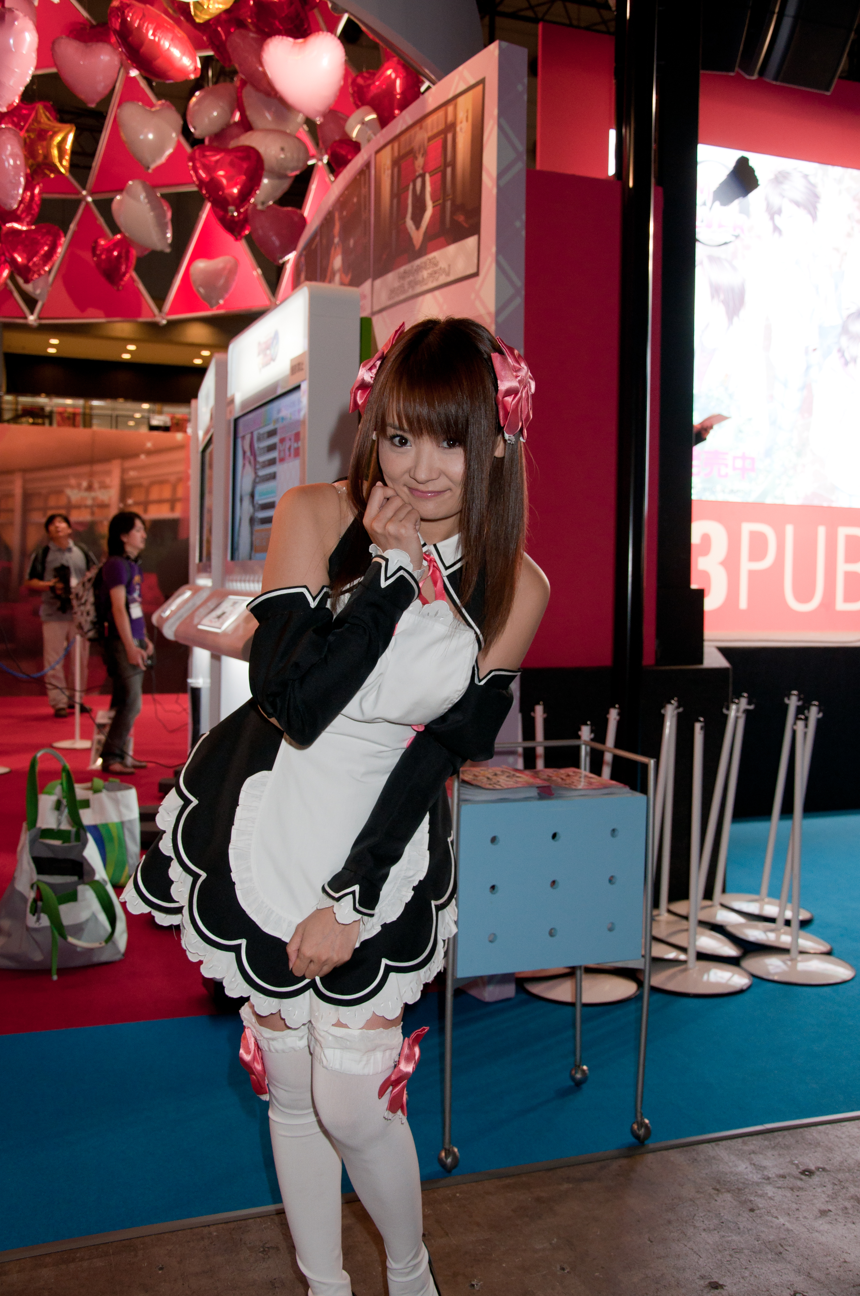 2010東京電玩展，D3 Publisher攤位的宣傳模特兒市川みかcosplay《美夢俱樂部》亞麻音。